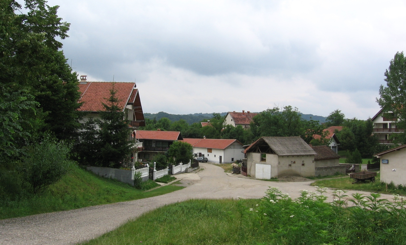 Курдеш